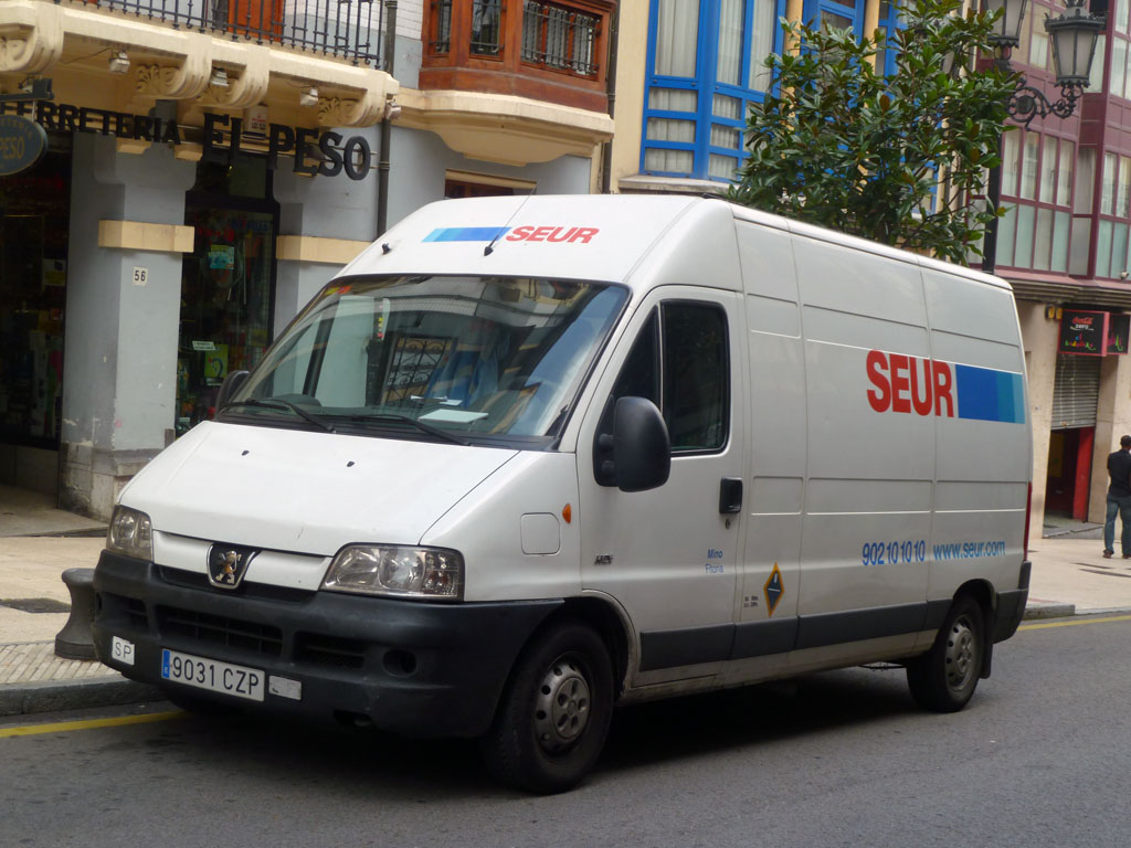 Furgón Peugeot de la empresa de paquetería SEUR.